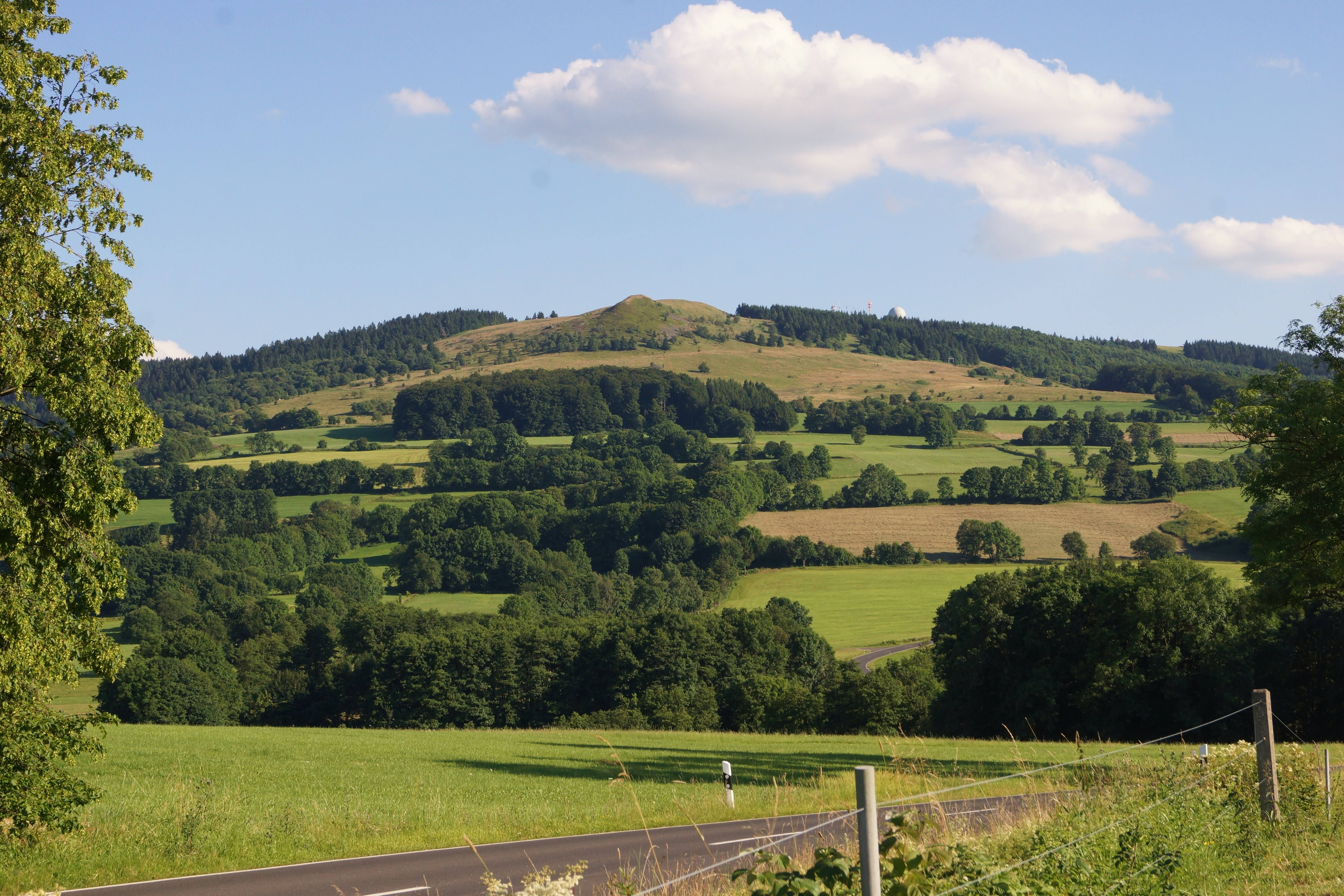 Südseite der Wasserkuppe, Foto kurz hinter Dietges aufgenommen